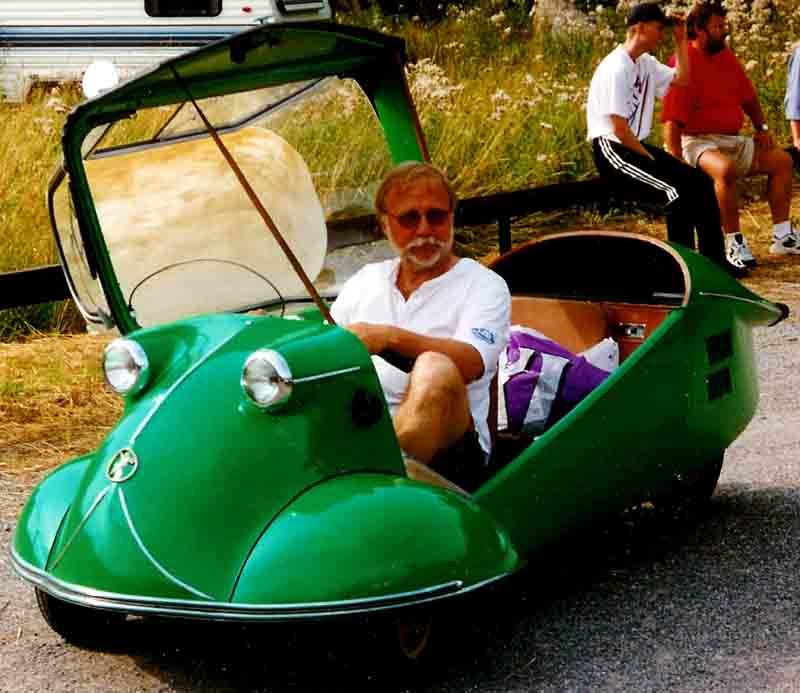 Messerschmitt K175 1954